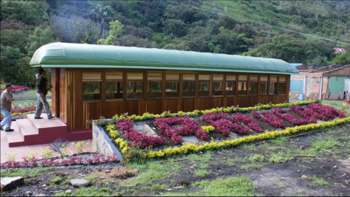 Foto del balneario La Rivera